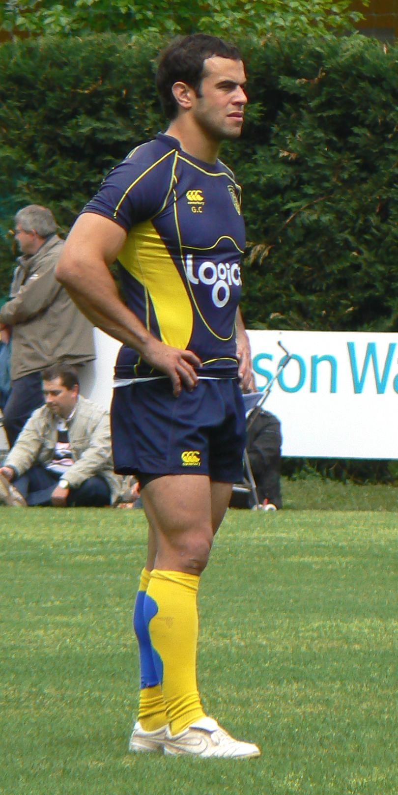 Le rugbyman italien Gonzalo Canale s'entraine avec l'ASM Clermont Auvergne.